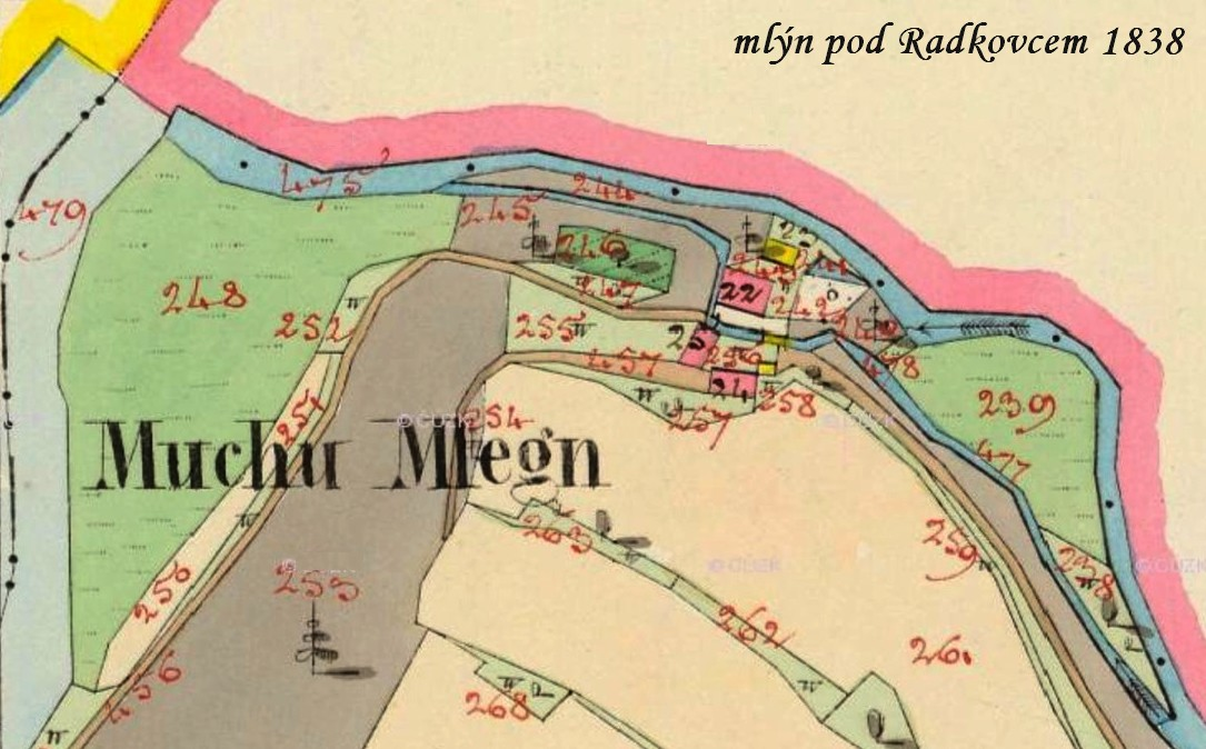 Muchův mlýn pod Radkovcem - část císařského otisku stabilního katastru 1838